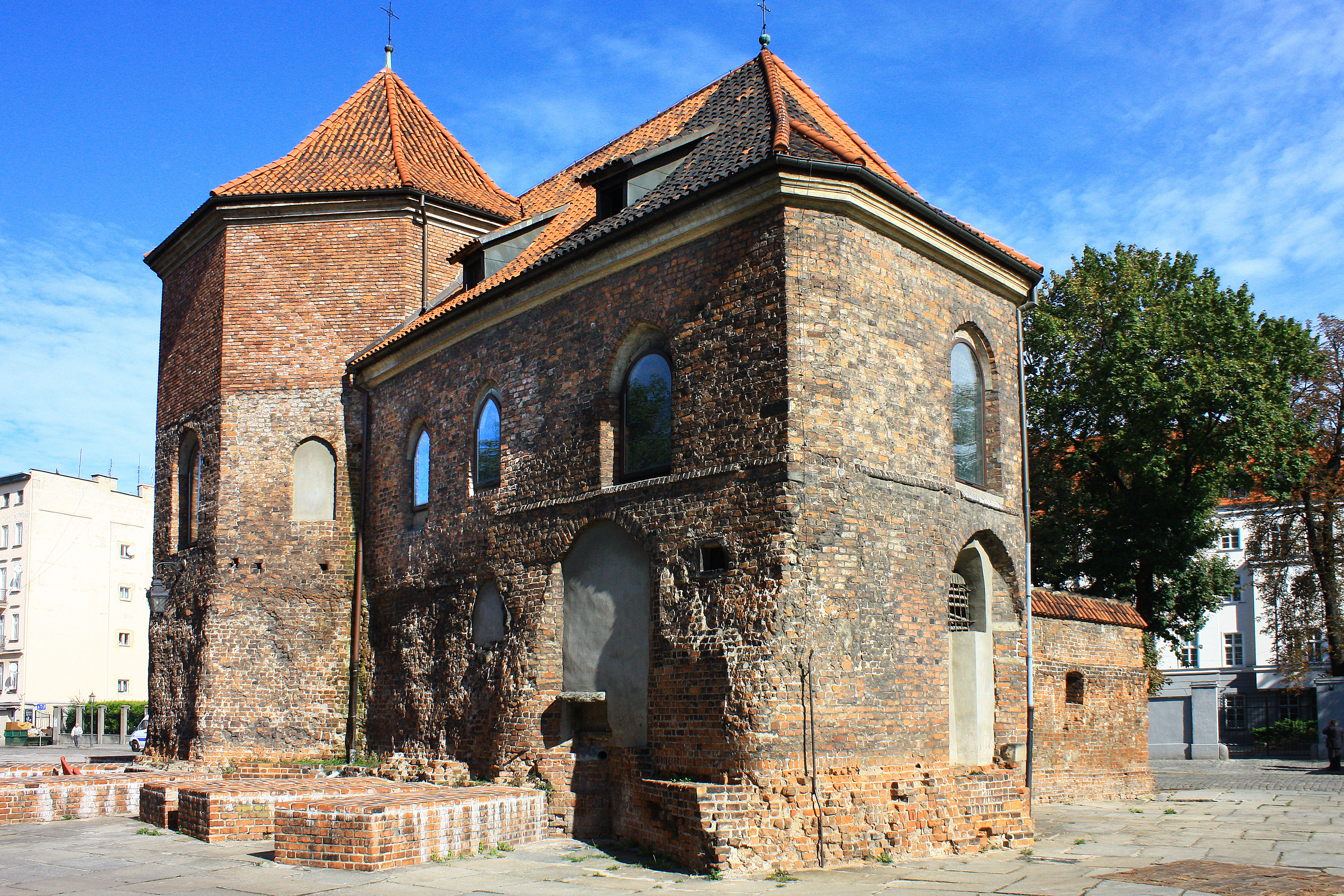 Wrocław, kościół p.w. św. Marcina, XIII, 1958-1968